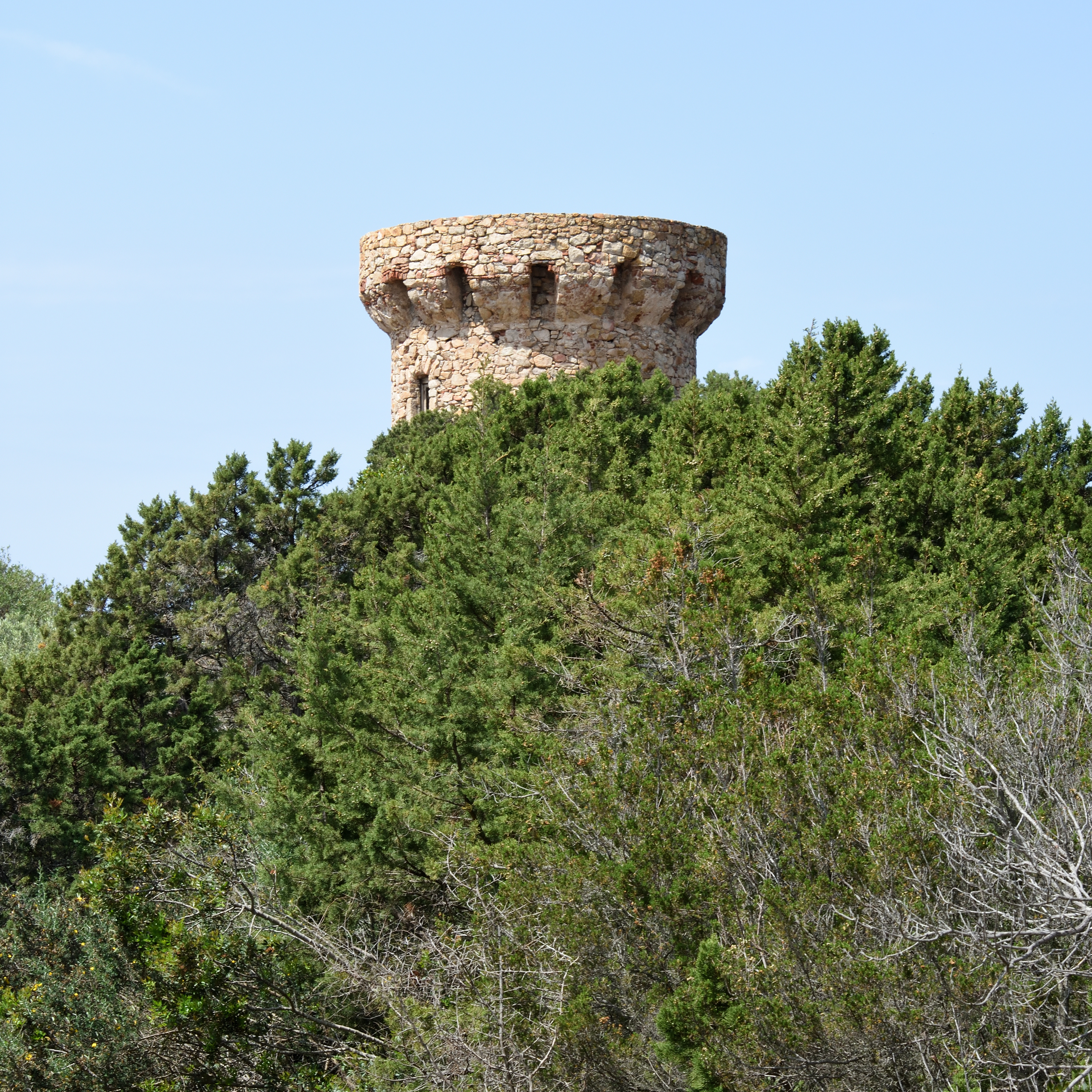 La tour Genovèse de l`Isolella sur la Punta di sette nave au sud du golfe d`Ajaccio en Corse